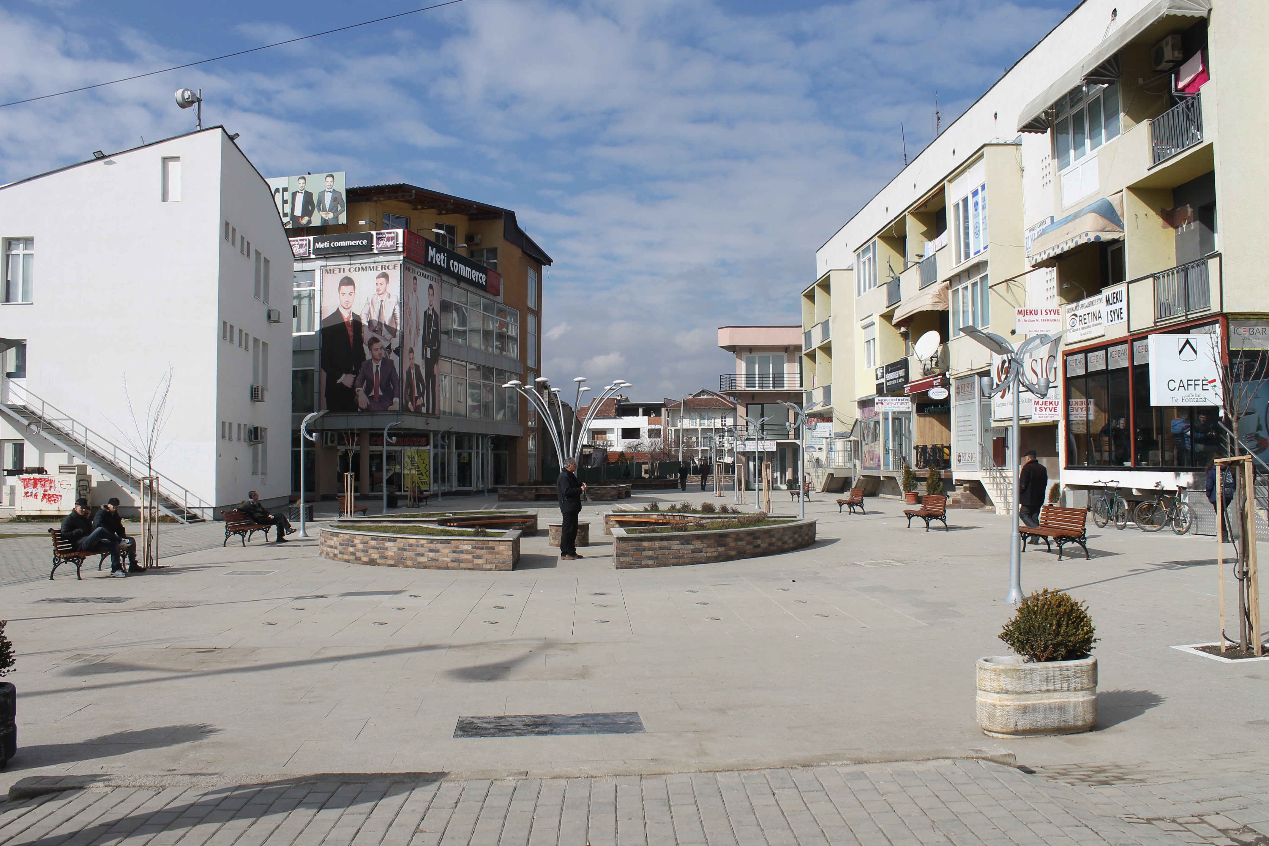 Sheshi i Qytetit në Gjilan i cili quhet Sheshi Rexhep Malaj dhe Nuhi Berisha